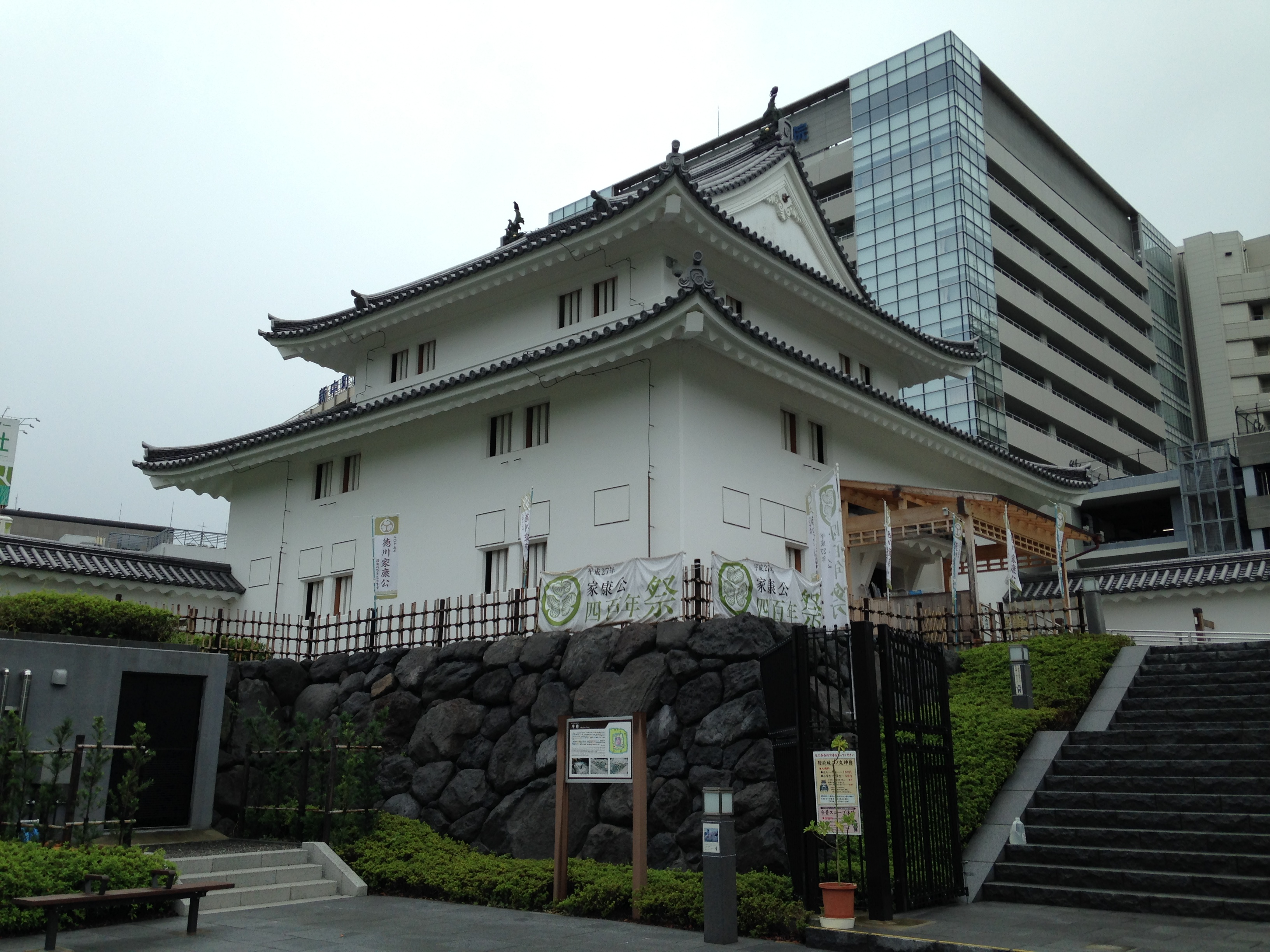 駿府城の坤櫓